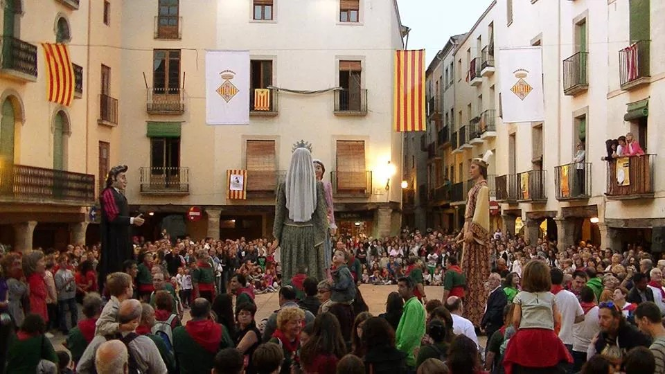 Trobada de Gegants. Festa Major de Cervera de 2015.